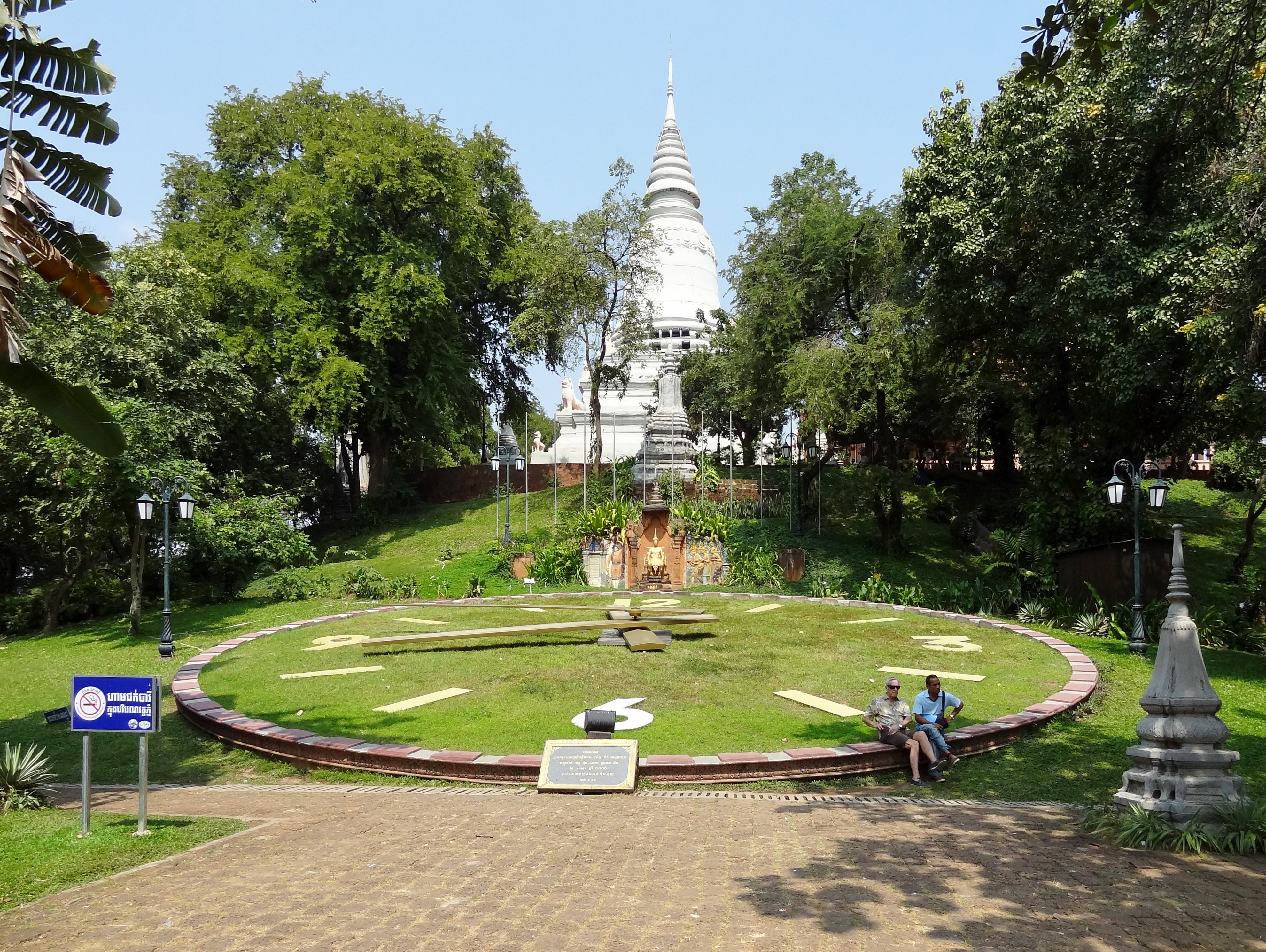 Wat Phnom Daun Penh in Phnom Penh, Kambodscha